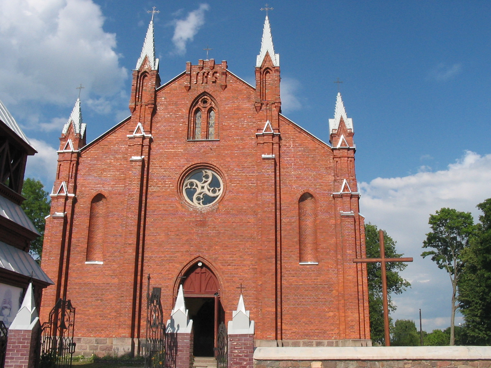 Беларуская (тарашкевіца): Андрэеўскі касьцёл і званіца. в. Нарач This is a photo of Belarusian heritage monument. Reference number: 612Г000443 ( WLM)